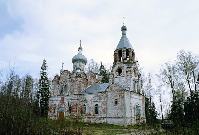 Вознесенская церковь (1896) в Новопокровском (Кинешемский р-н). Бывшая единоверческая при бывшем селе Новопокровском. Единственным священником храма с 1897 по 1939 гг. был Михаил Александрович Василевский (1866-1953), отец маршала А. Василевского.